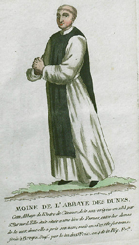 Collection de costumes de tous les ordres monastiques, supprimés à differentes époques, dans la ci-devant Belgique, Bruxelles, Philippe Joseph Maillart et sœur, 1811